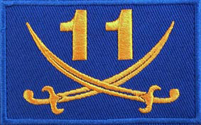 Шеврон 11 б ТрО.